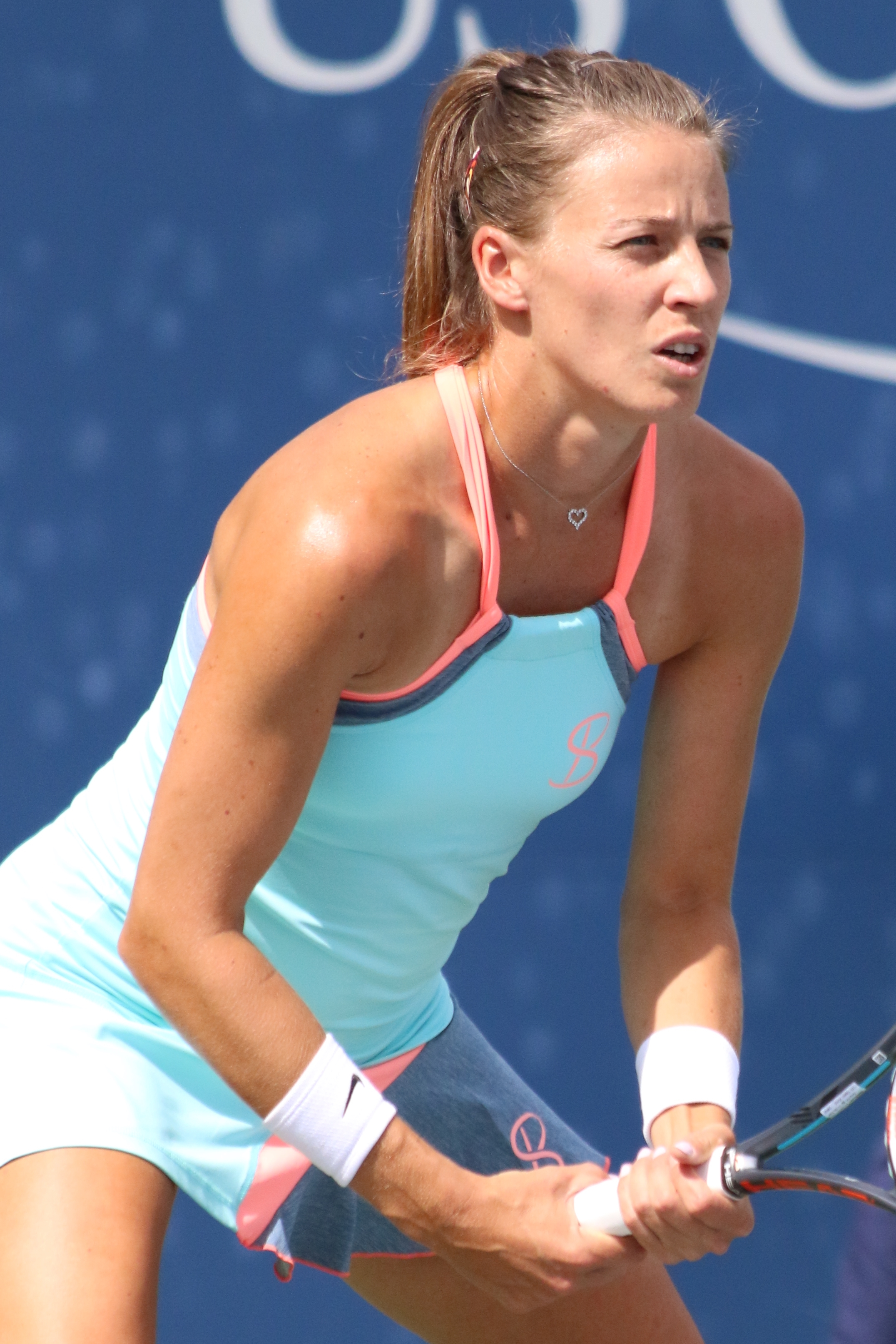 Rosolska US16 (13)